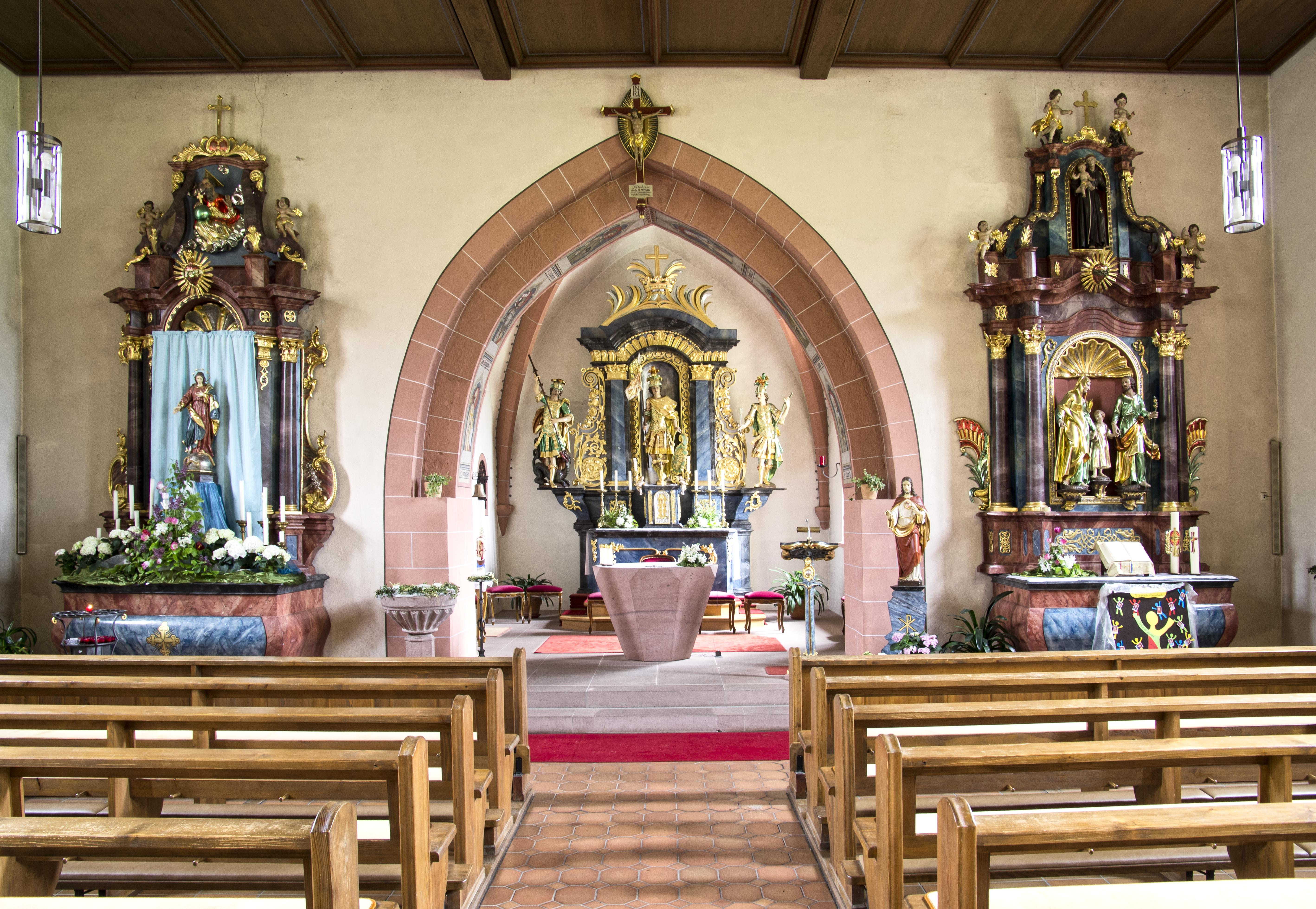 Bilder von der Pfarrkirche St. Mauritius in Prinzbach bei Biberach